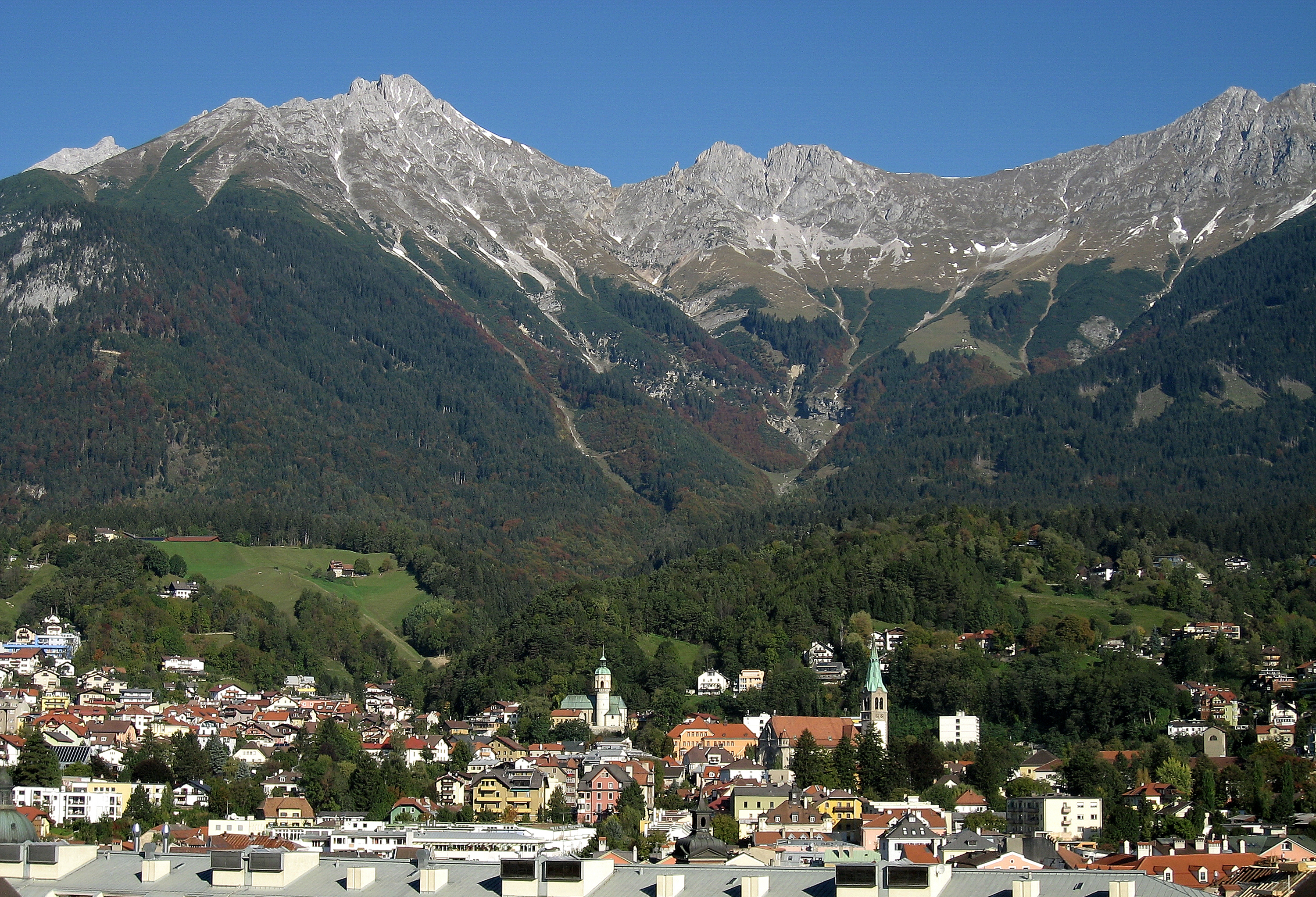 Österreich, Innsbruck, Blick von der Rathausgalerie auf die Nordkette. Vordere Brandjochspitze (2559m); in der Mitte Frau Hitt (2269m, der markante Turm), westliche (2339m) und östliche Sattelspitze (2369m); langer Sattel (2258m) und Kemacher (2482m) bilden die Umrandung der Höttinger Alm.